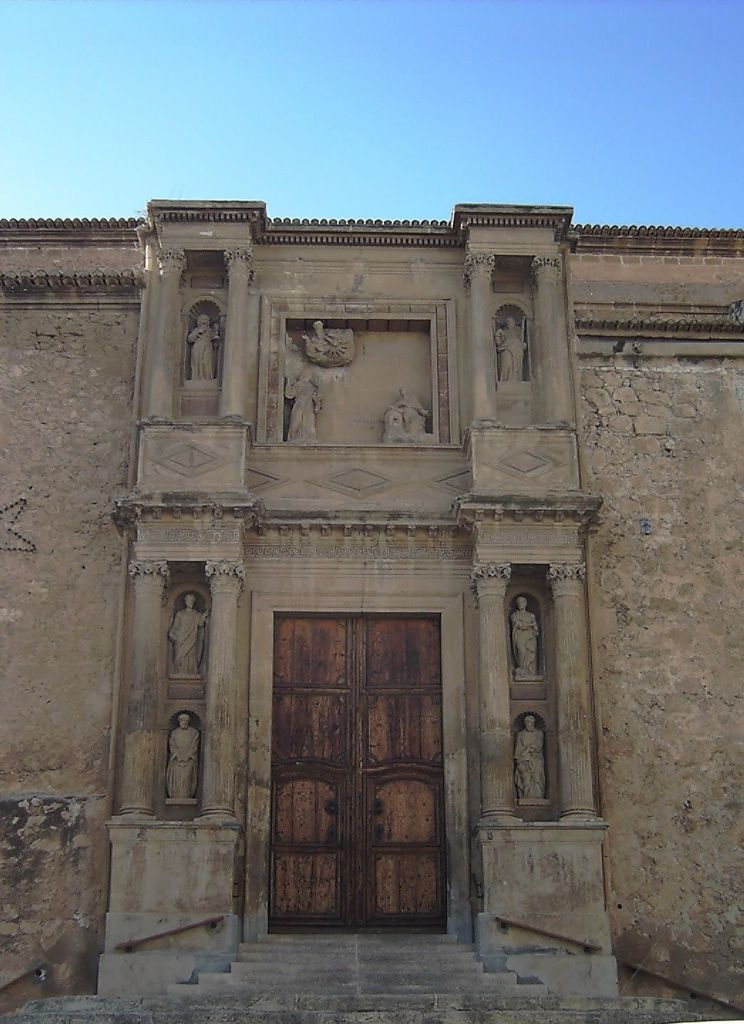 Hellin, Albacete, España. Iglesia de la Asunción, en la plaza de la Iglesia. Detalle de la puerta. Diciembre de 2005. -- Hellin, Albacete, Spain. Church of the Asuncion, december 2005. Detail of the door. -- Own picture, given to PD.